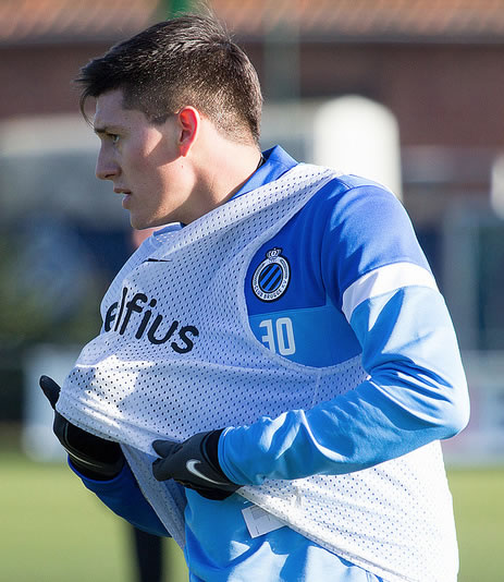 Nicolás Castillo, speler van Club Brugge